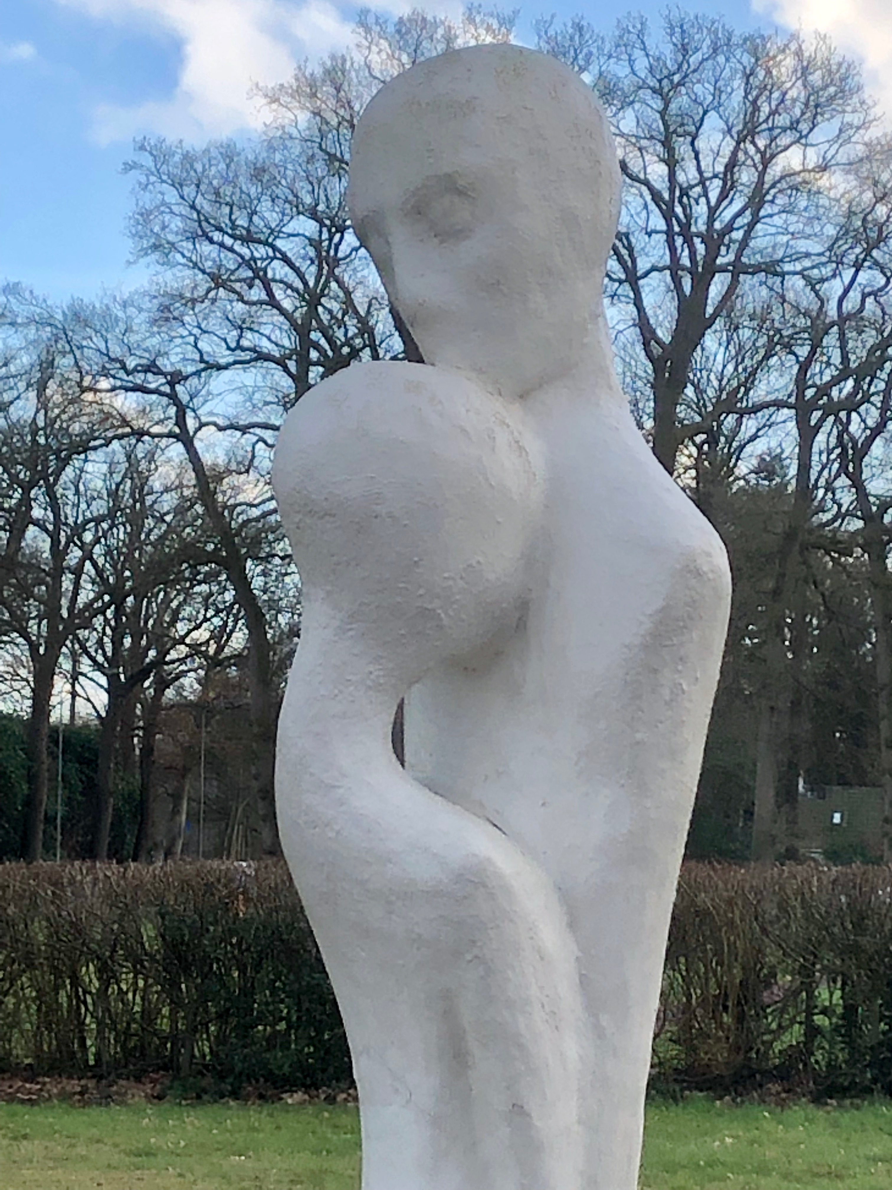 Liefdespaar door Jan Dekkers, Beilerstraat in Assen